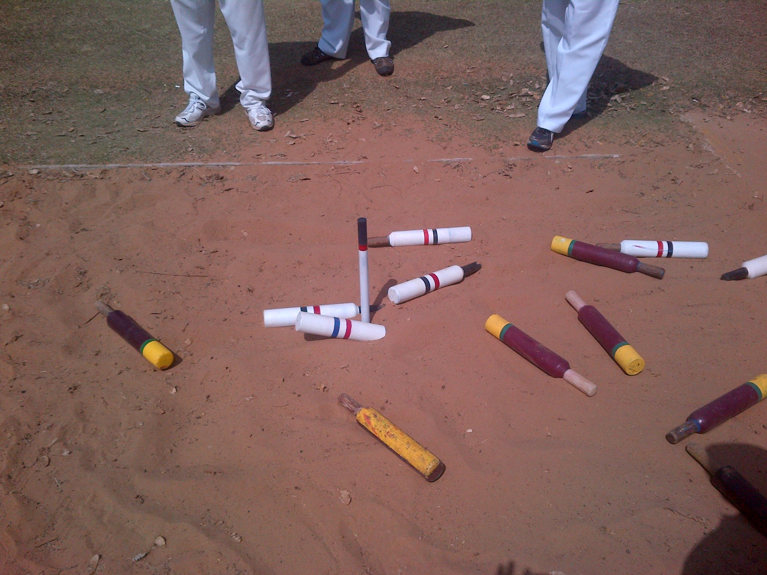 A classic jukskei game